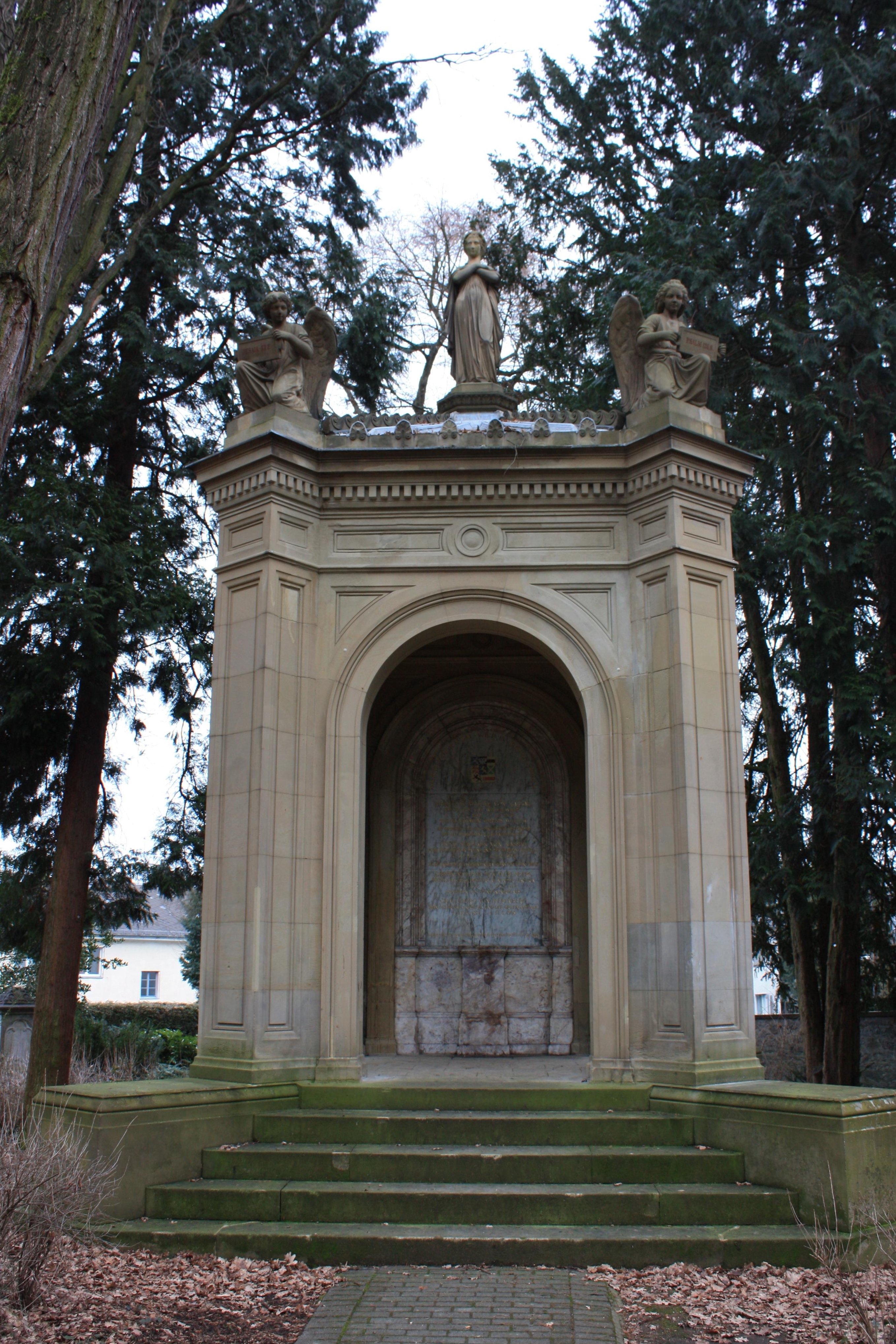 Das Mausoleum für Herzogin Pauline von Nassau (1810–1856), ihren Sohn Nikolaus Wilhelm (1832–1905) und dessen Gemahlin Natalya Alexandrowna Pushkin “Gräfin von Merenberg” (1836–1913) auf dem Alten Friedhof Wiesbaden.